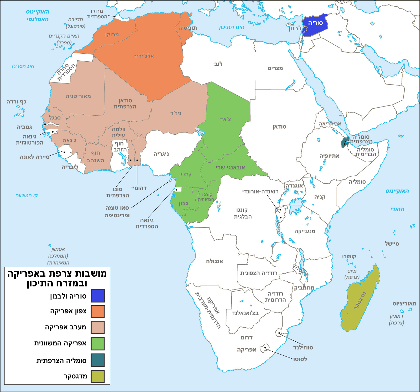 מושבות צרפת באפרקיה ובמזרח התיכון